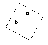 Питагорова теорема - Доказателство 2